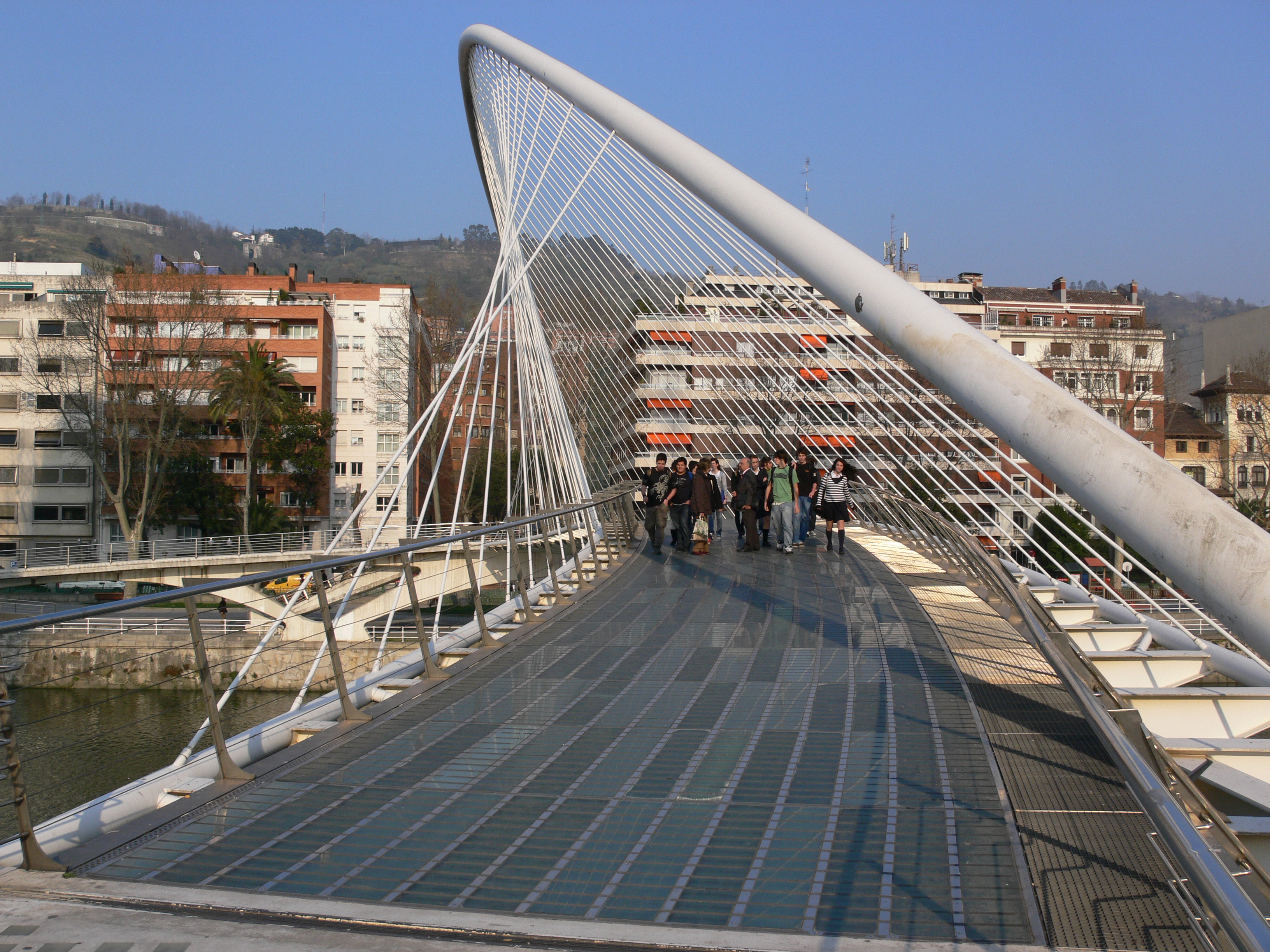 Zubizuri footbridge, Bilbao